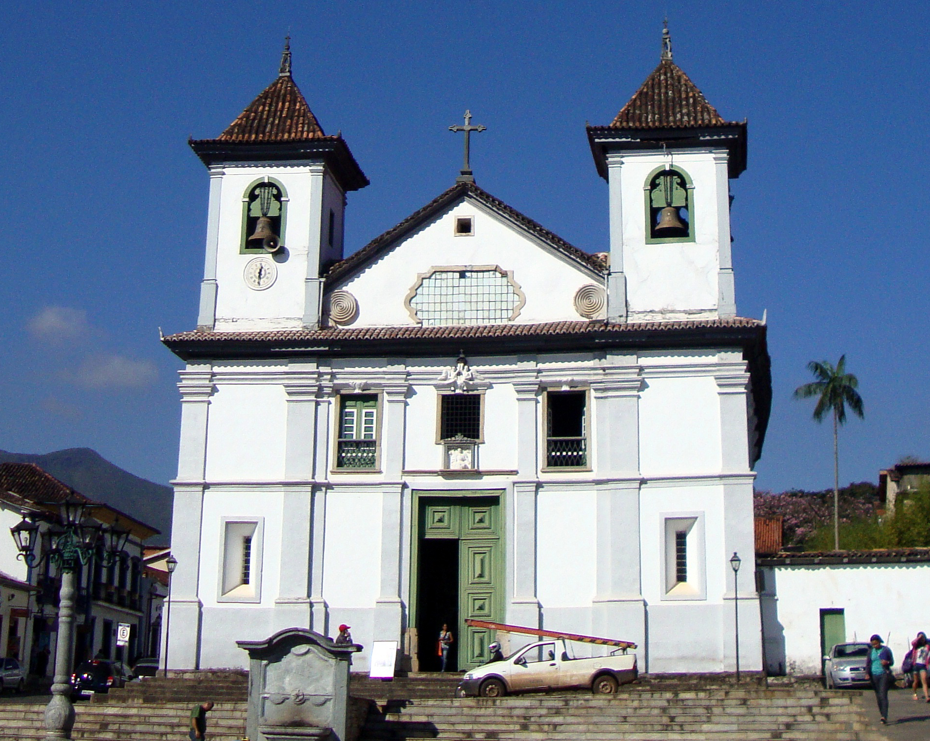 Português do Brasil: Igreja da Sé